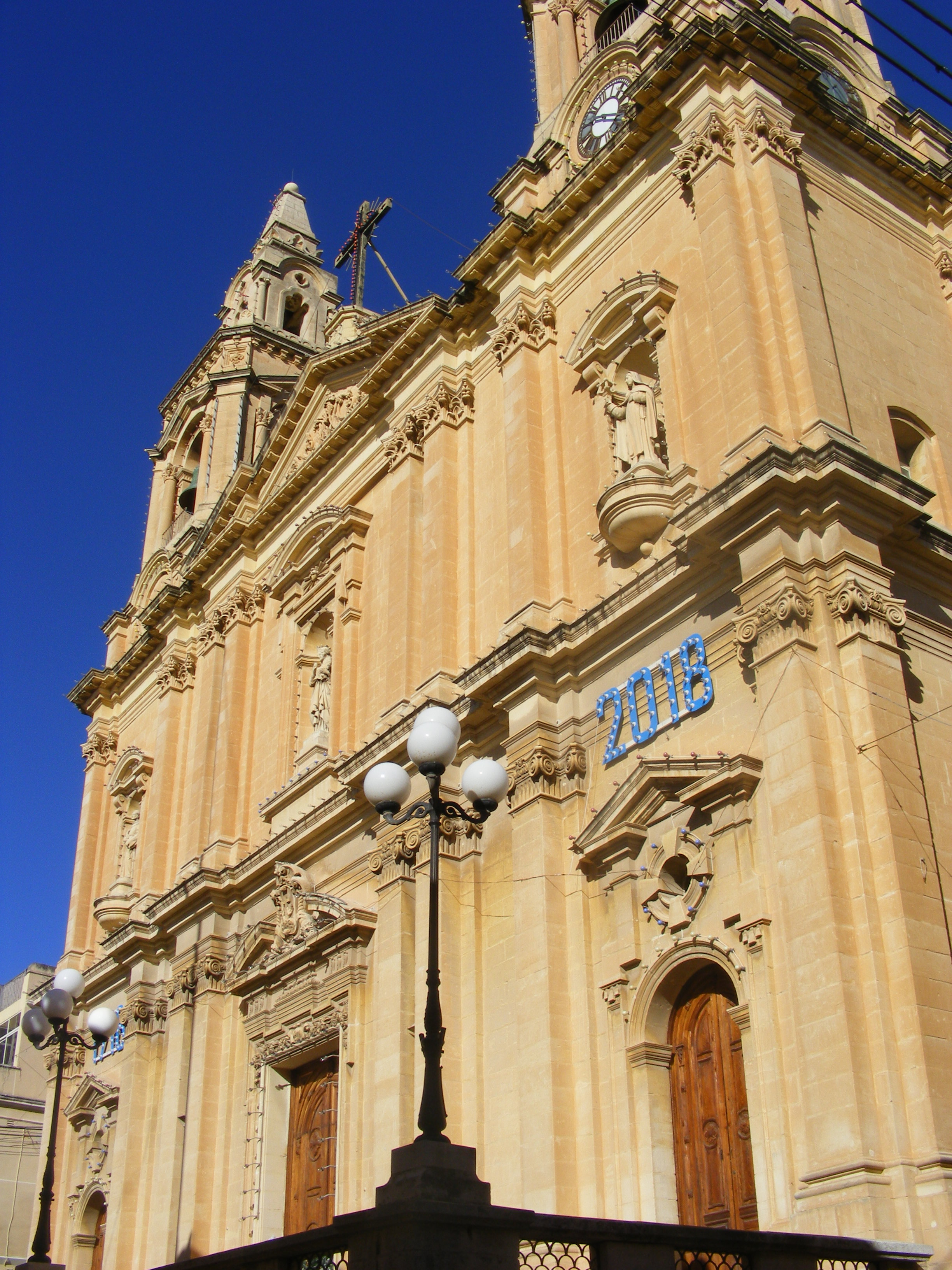 Kościół Sacro Cuor w Sliemie, Malta